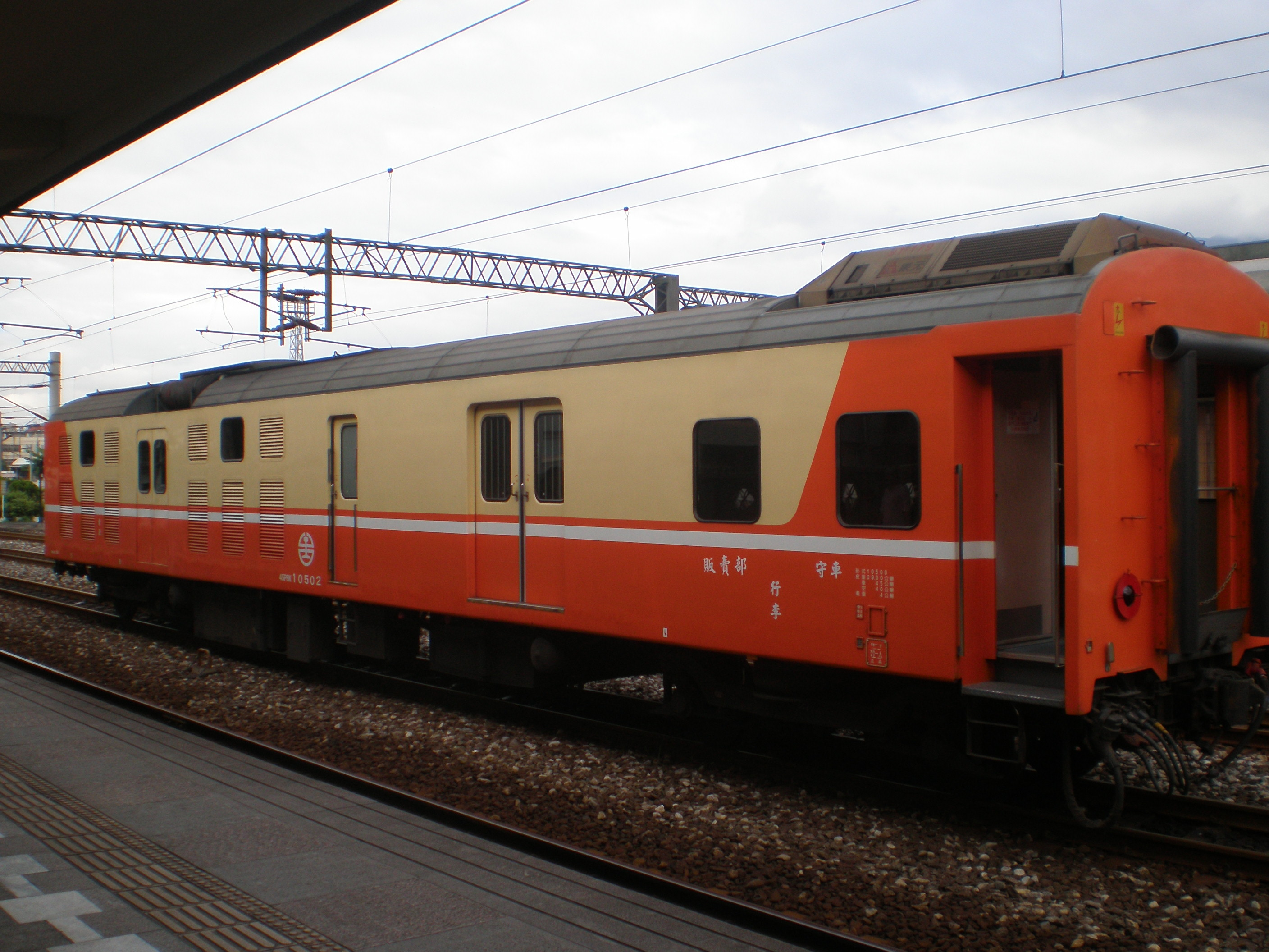 臺灣鐵路管理局電源行李車PBK10502停靠花蓮車站。